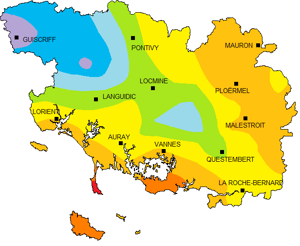 précipitation annuelle dans le Morbihan, moyenne sur la période 1997-2006, carte établi d'après les données de météo-france